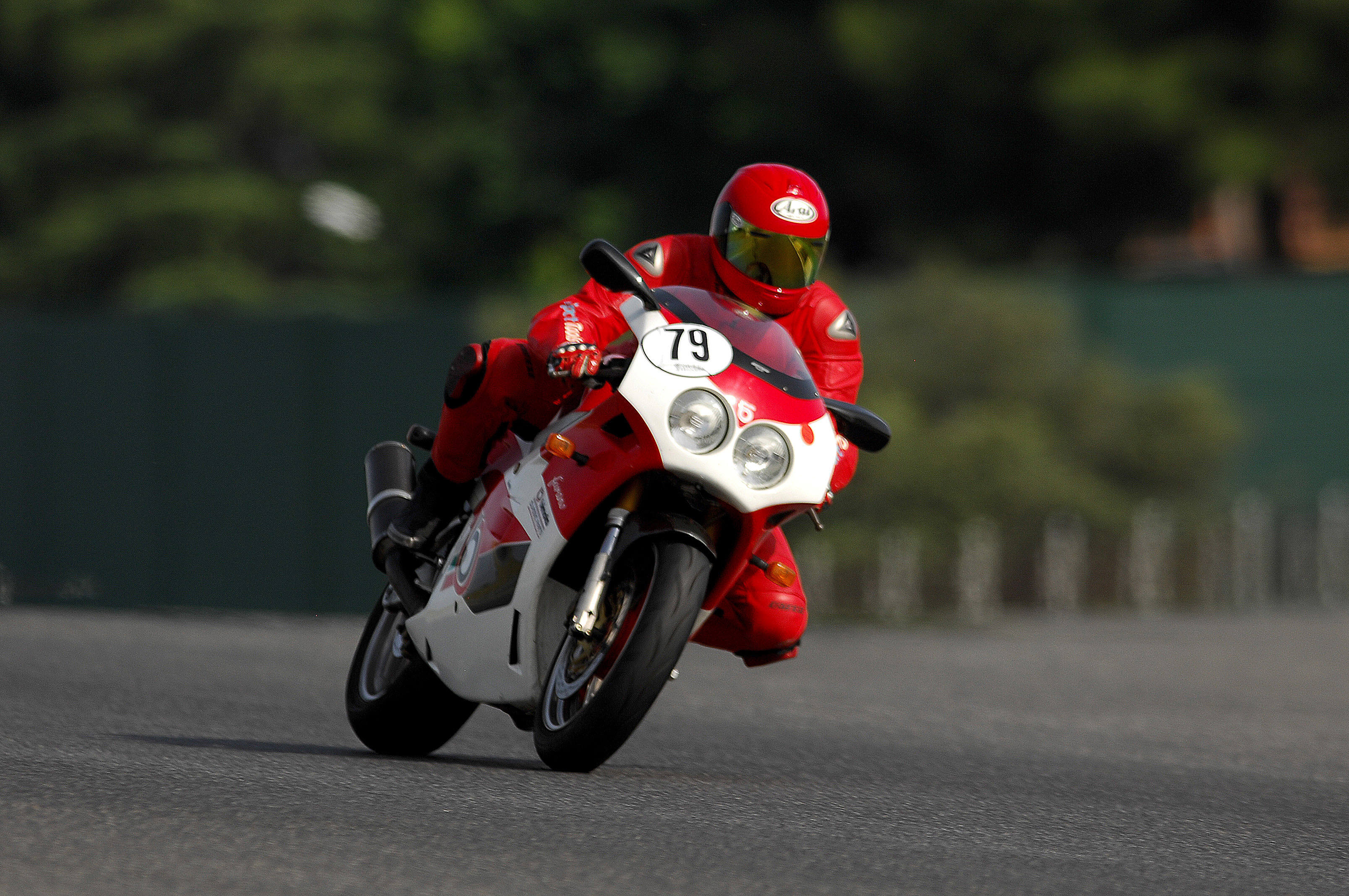 Bimota Furano, en el circuito del Jarama